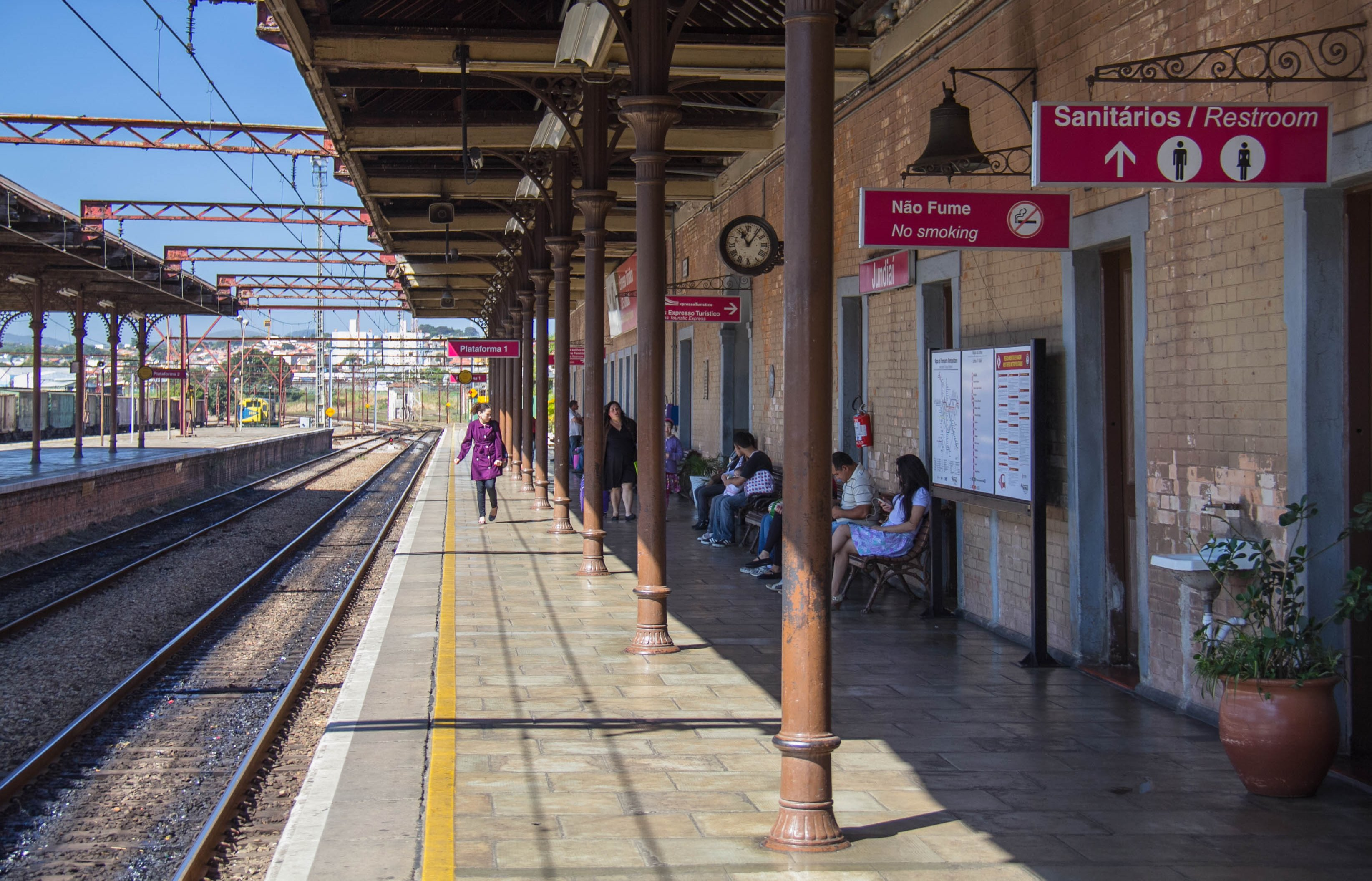 Estaço ferroviária de Jundiai e expresso turístico da CPTM